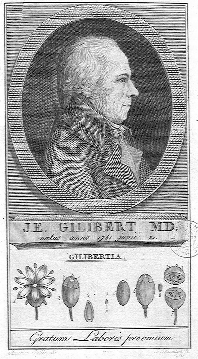 Portrait de Jean-Emmanuel Gilibert (1741-1814)